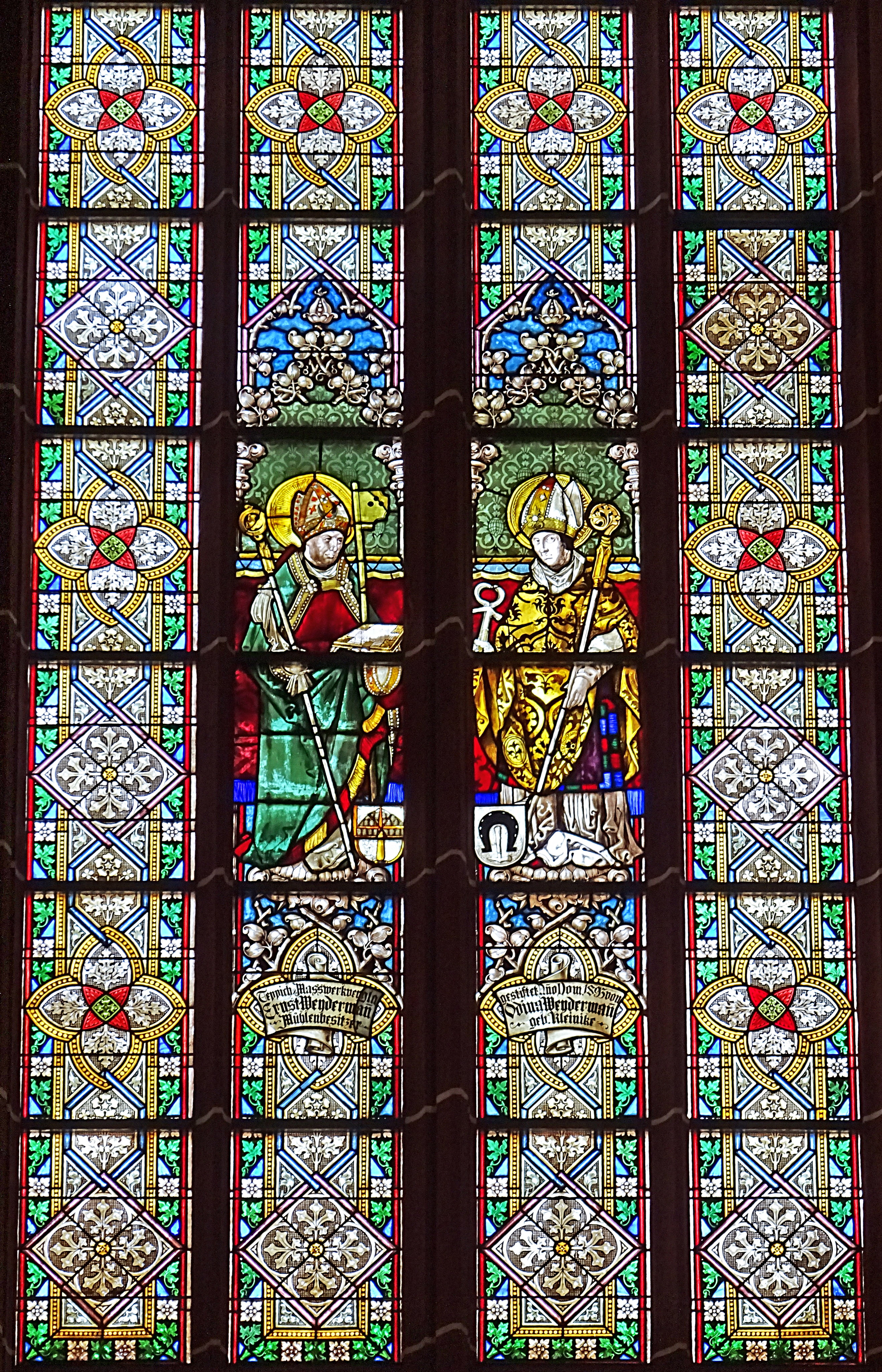 Bischöfe Elegius und Jacobus min., Buntglasfenster in der Johanneskirche Saalfeld